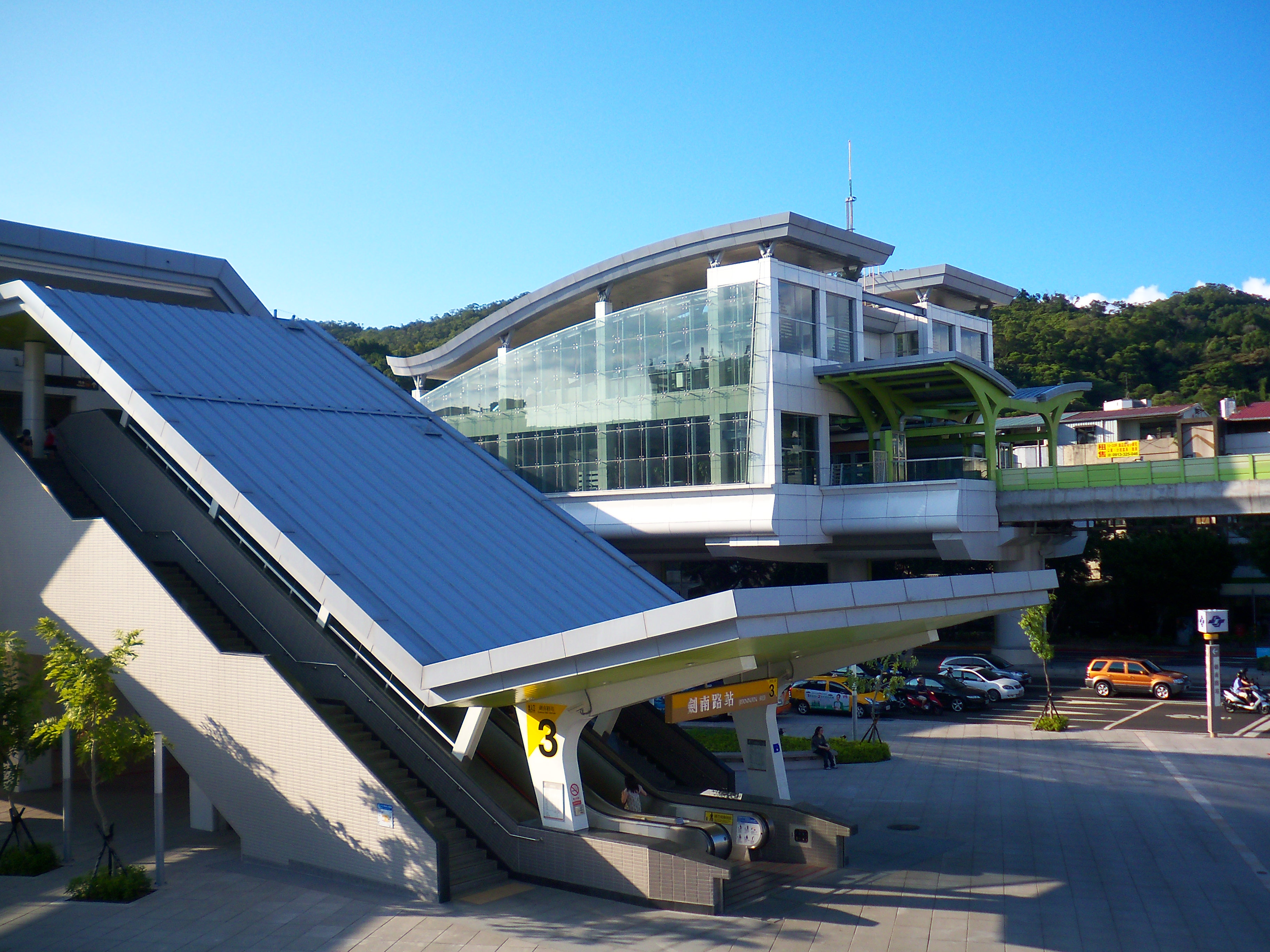 台北捷運内湖線剣南路駅駅舎東端と3号出口。